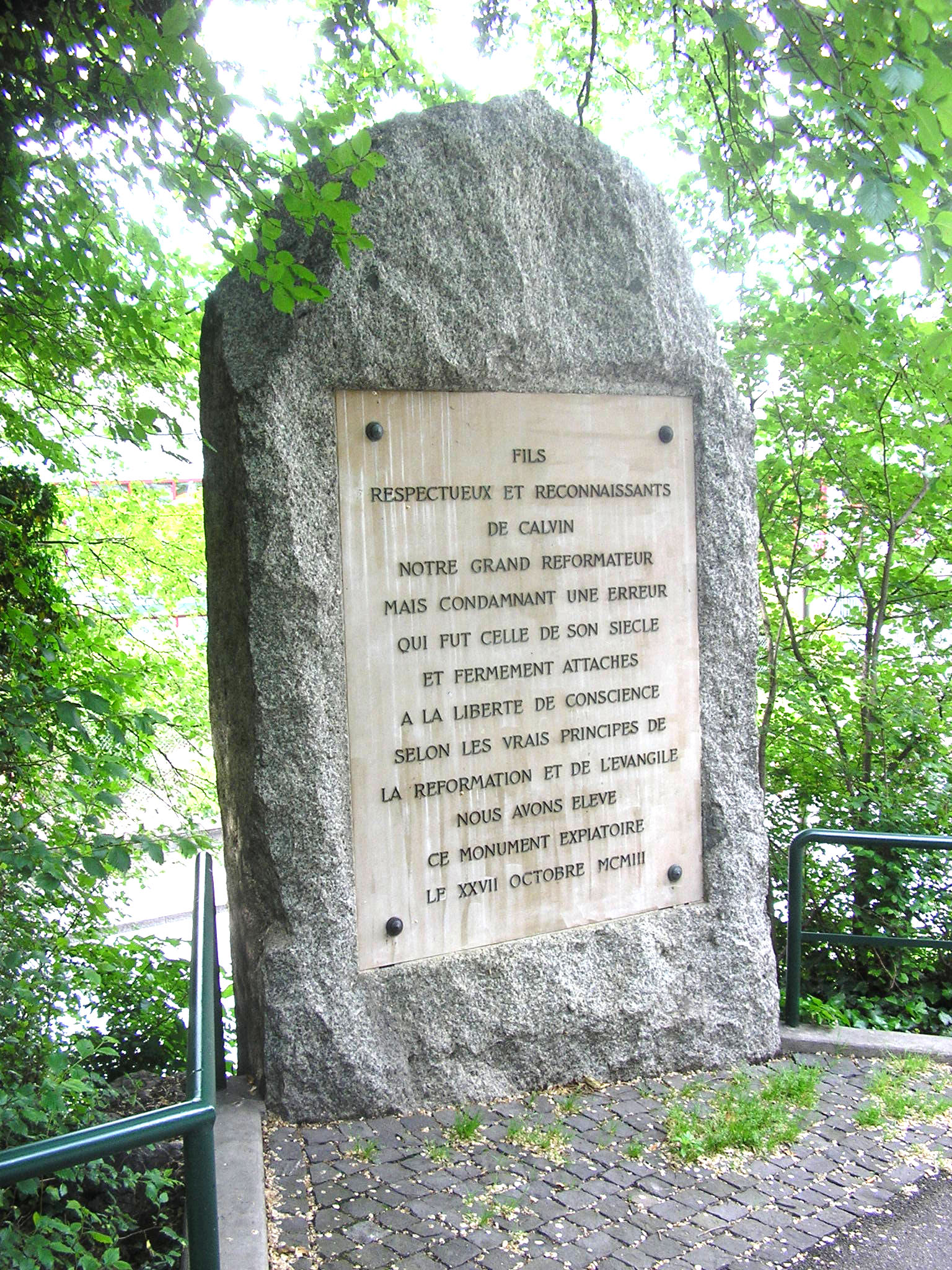 Monument de Michel Servet à Genève